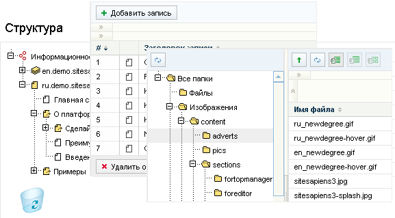 Беларуская (тарашкевіца): Site Sapiens